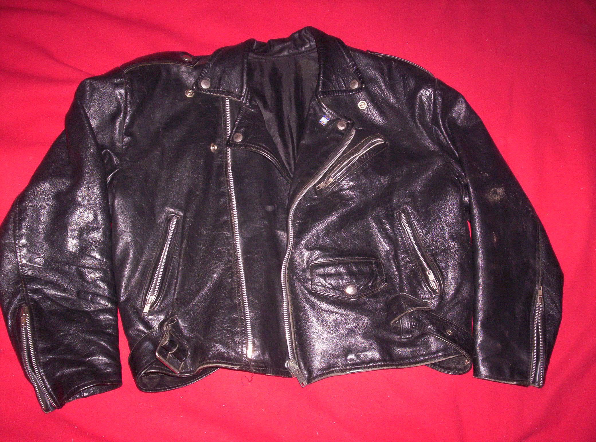 perfecto01.jpg